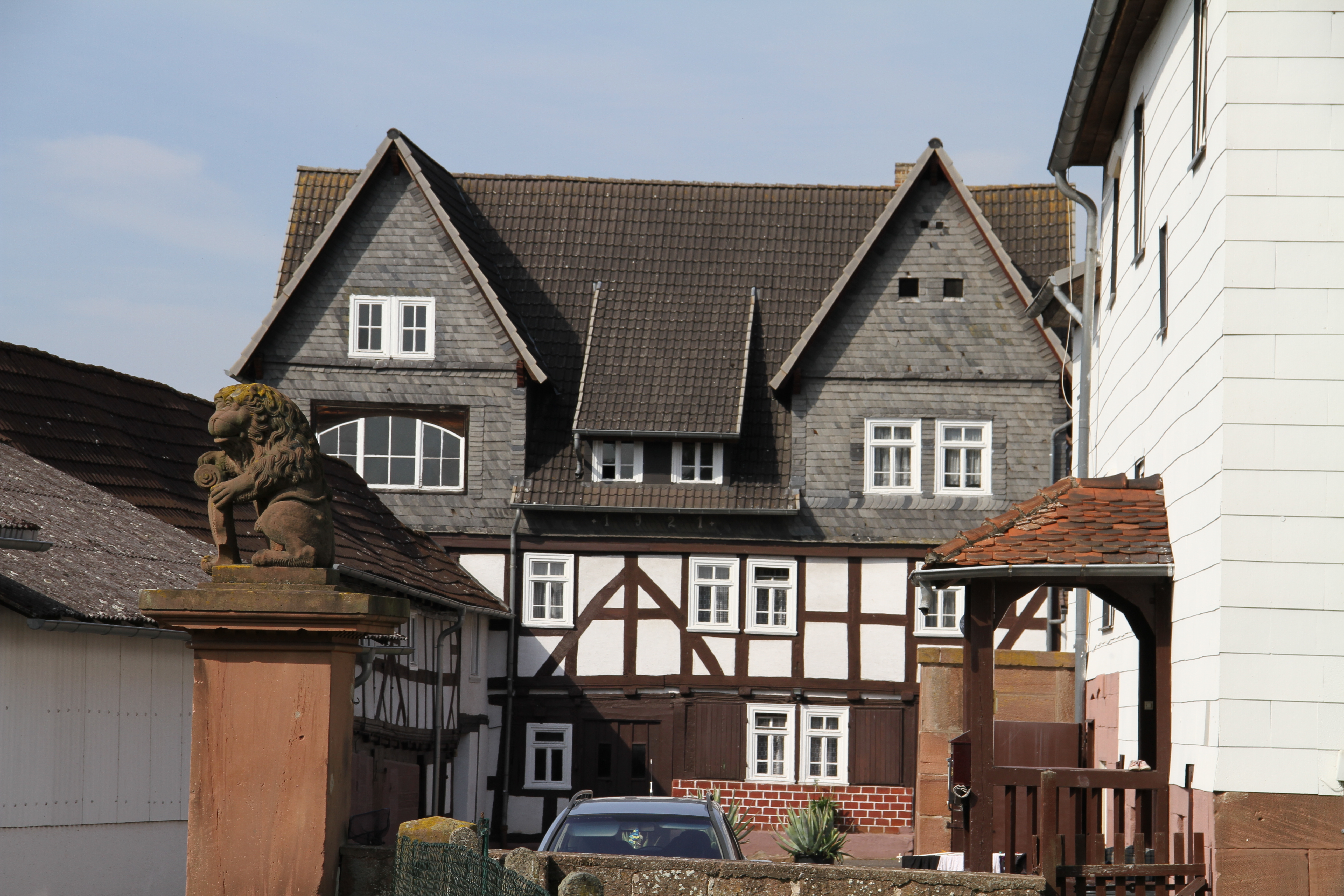 Dieses Foto entstand im Rahmen des Projekts Wiki Loves Monuments Mittelhessen, das aus dem Community-Projektbudget von Wikimedia Deutschland e. V. gefördert wurde.